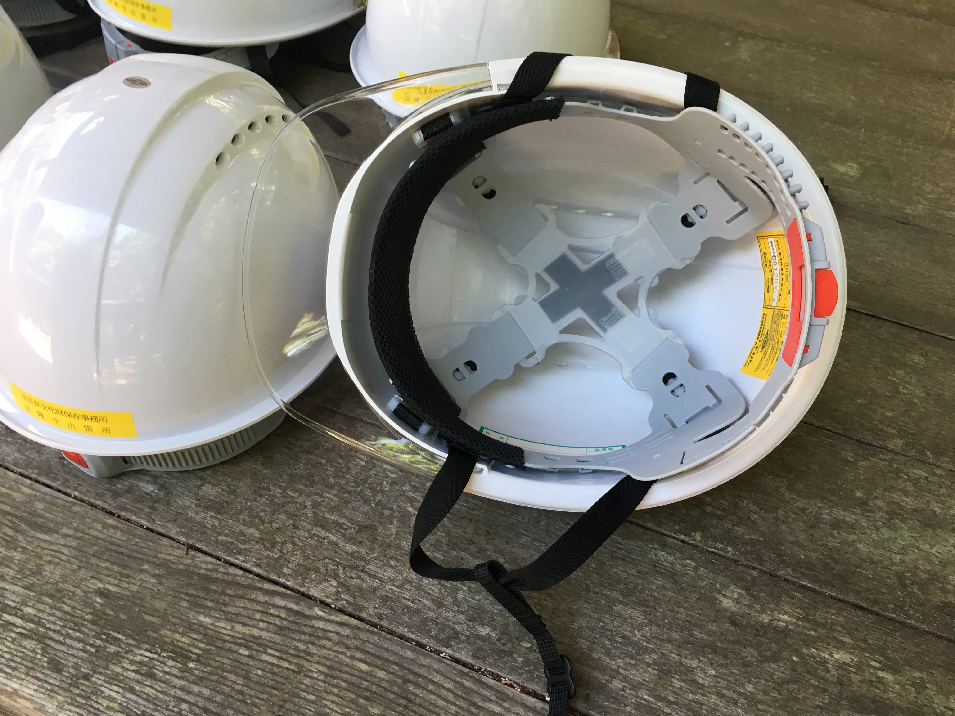 白いヘルメット（保護帽）